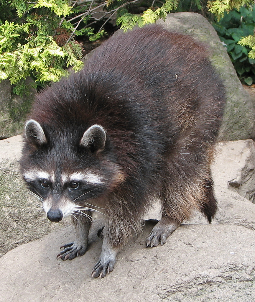 Beschreibung: Nordamerikanischer Waschbär (Procyon lotor) / raccoon Fotograf: Darkone, 5. August 2005